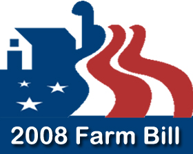 2008 Farm Bill logo (USA).